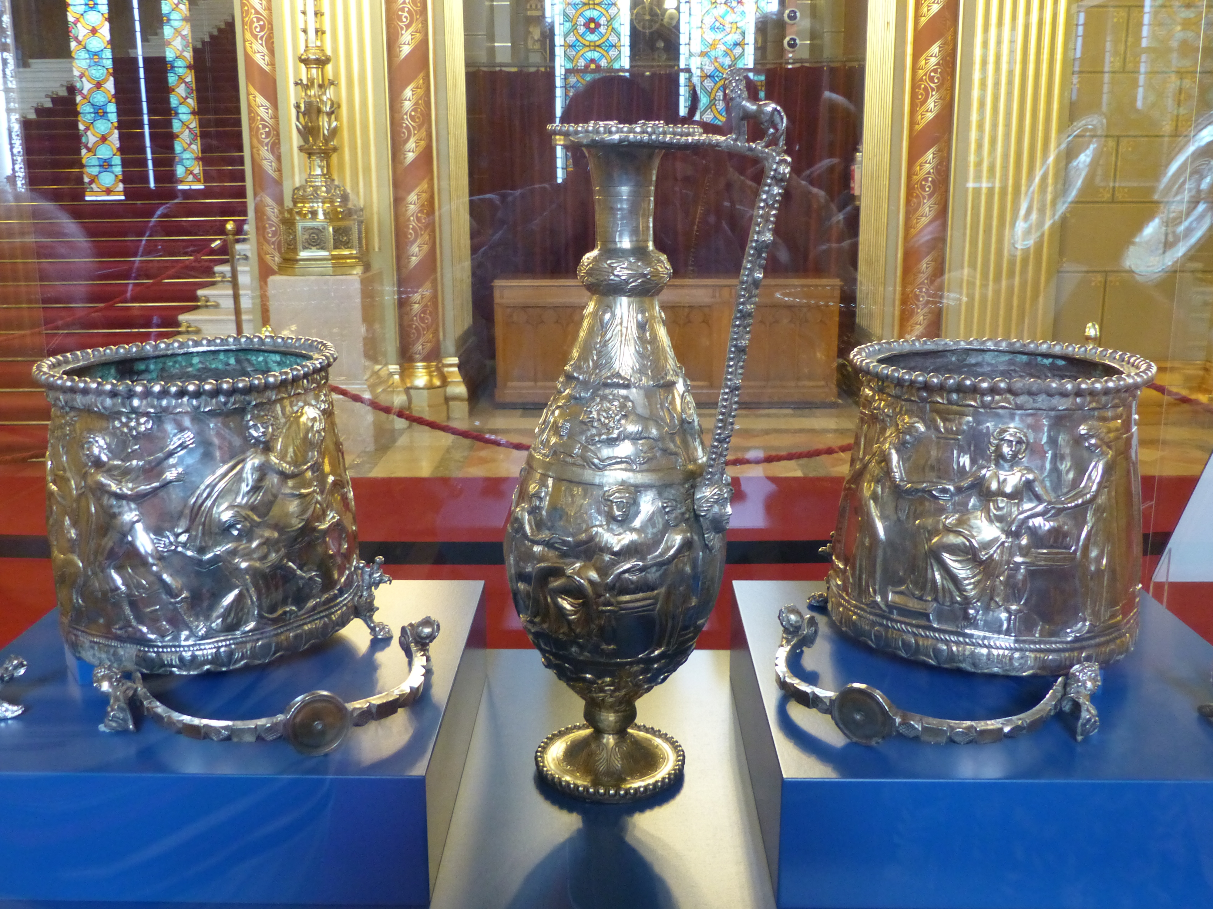 Hyppolitus készlet. Seuso kincs. A felvétel 2017. július 17-én hétfőn készült az Országházban. A készletː vödör A, magassága 22,7 cm, tömege 4436 gramm, vödör B, magassága 22,9 cm, tömege 4478 gramm, kancsó (fedéllel, domborműves aranyozott ezüst), magassága 57,3 cm, tömege 4051 gramm.